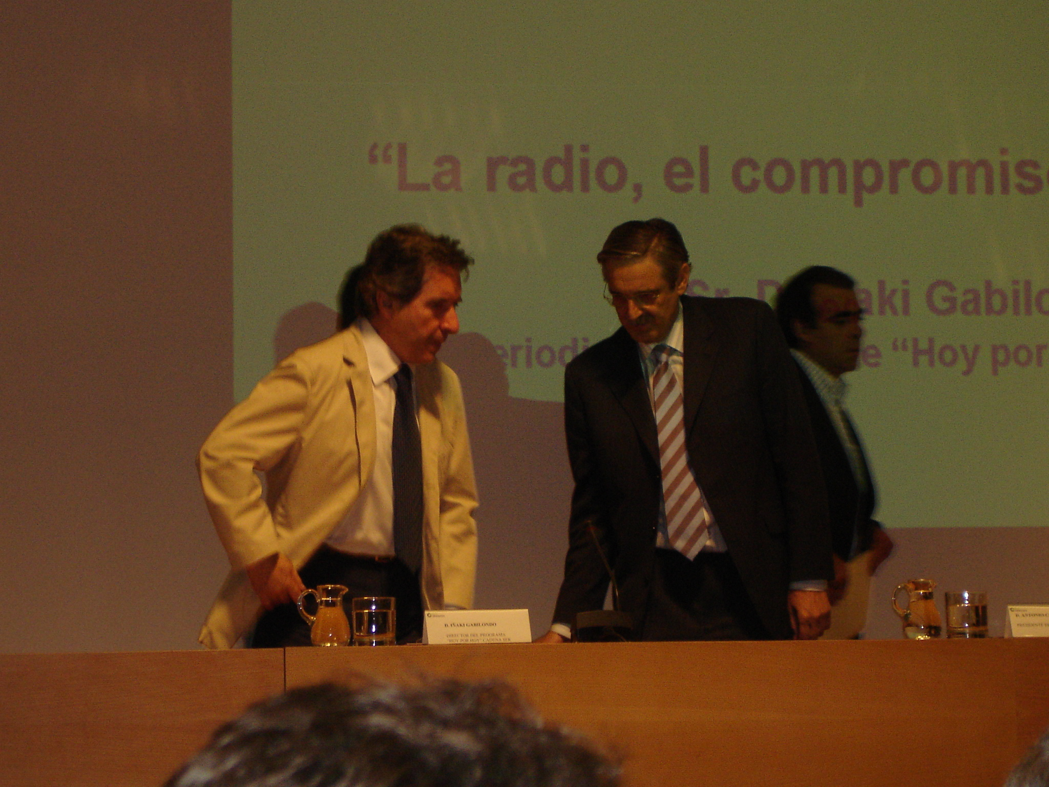 Iñaki Gabilondo en la conferencia "La radio, el compromiso del día a día" celebrada en Granada (España) en junio de 2005.